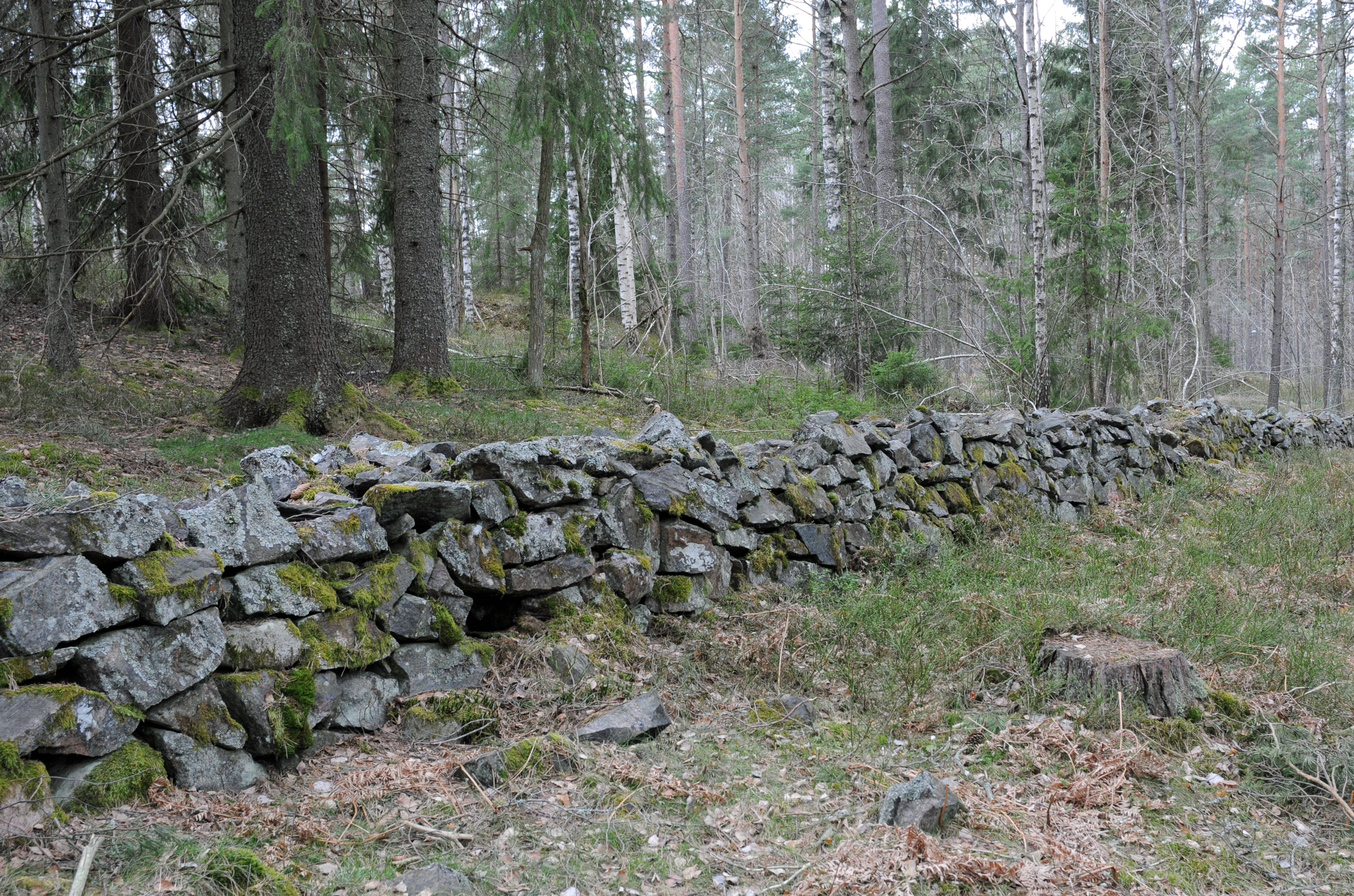 Hägnad, stenmur, Hållet-Marieberg-Stenbro naturreservat i Nyköpings kommun